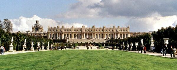 Gartenfassade des Schlosses Versailles